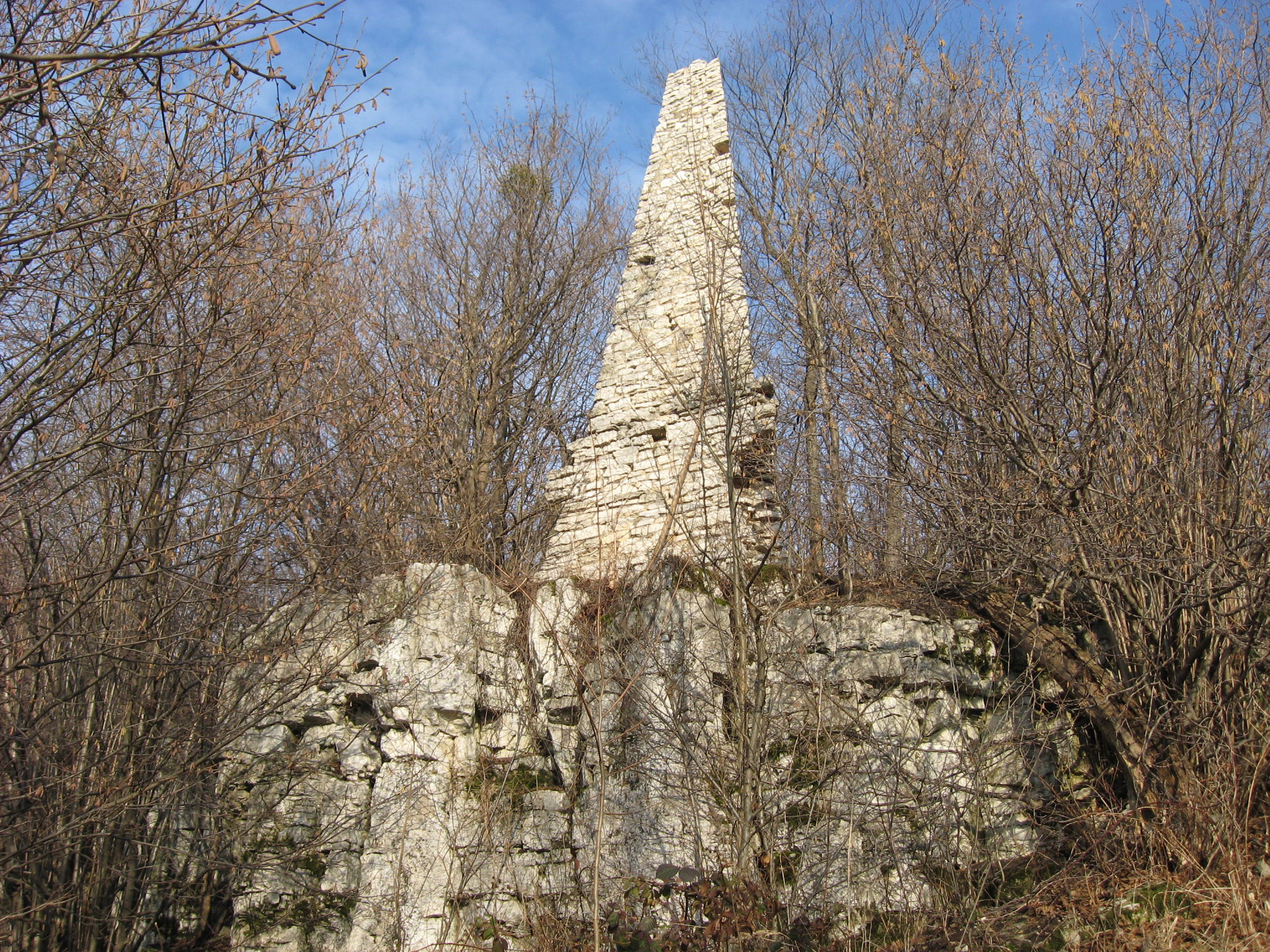 Kamienny obelisk na Zakrzowskiej Szpicy